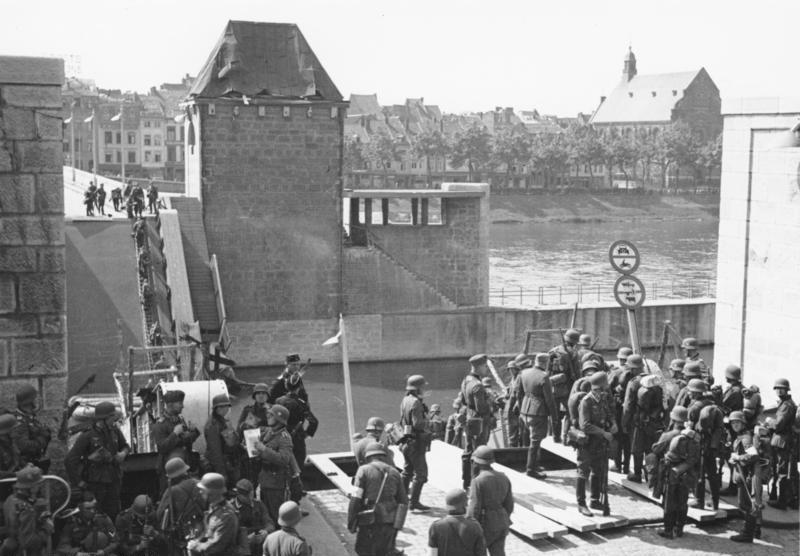 Maastricht. Infanterie wartet auf das Übersetzen zur weiteren Verfolgung des Gegners. 10.5.40 nachmittags